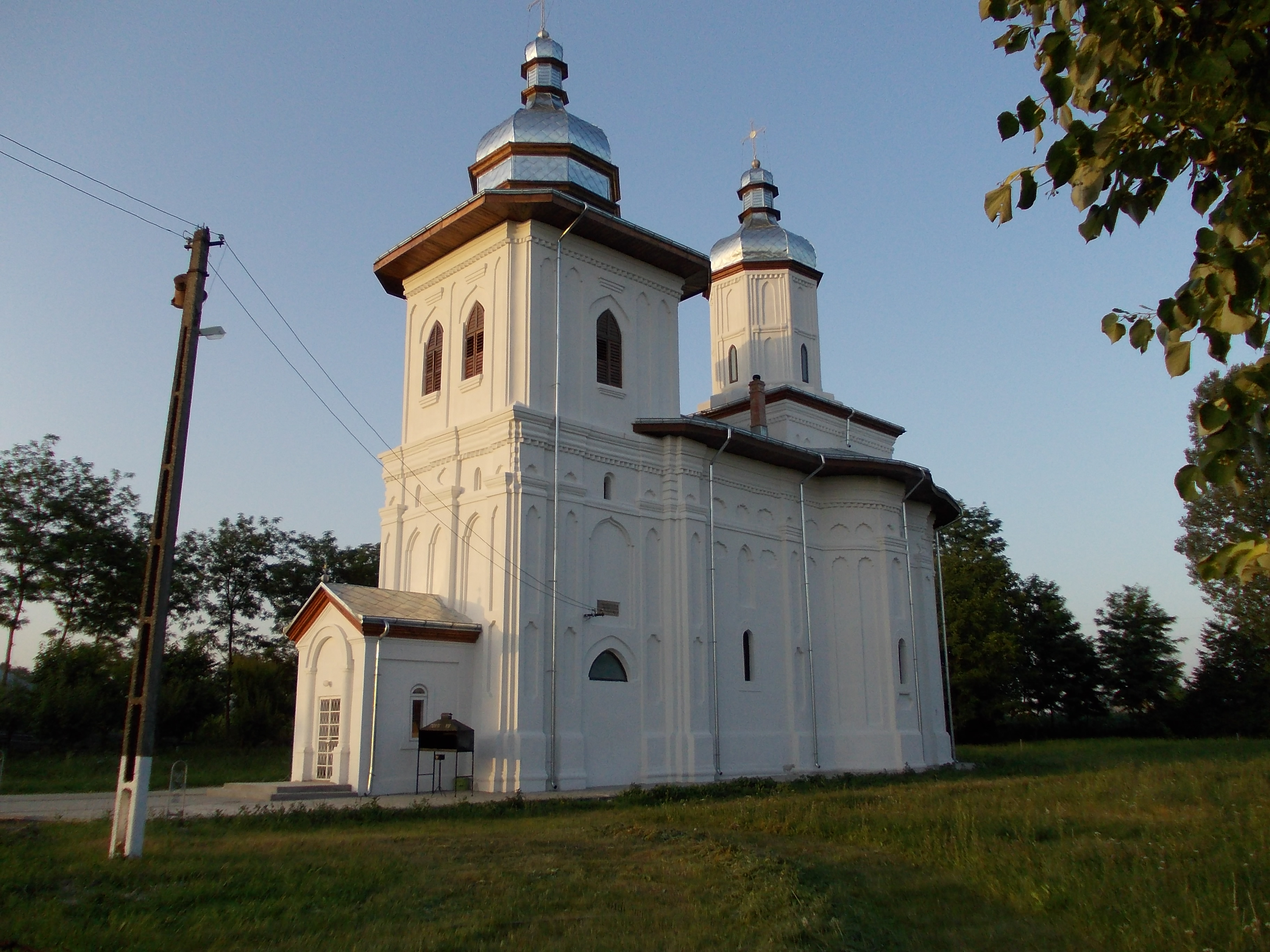 Iglesia de la Santísima Trinidad de Doljeşti, Rumania